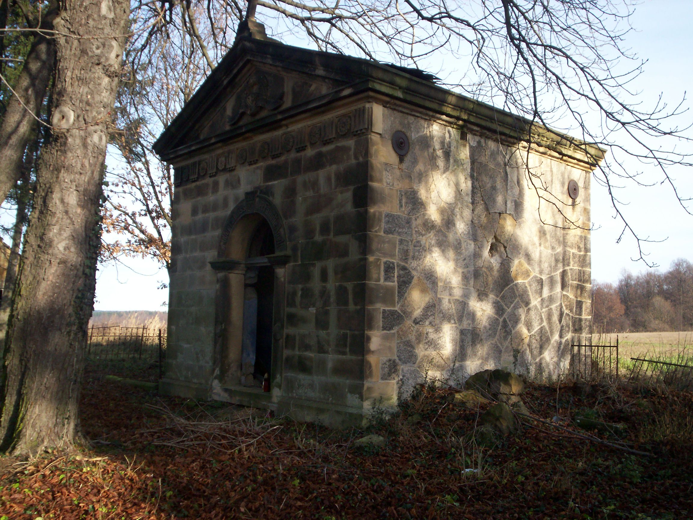 Bielanka, cmentarna kaplica.